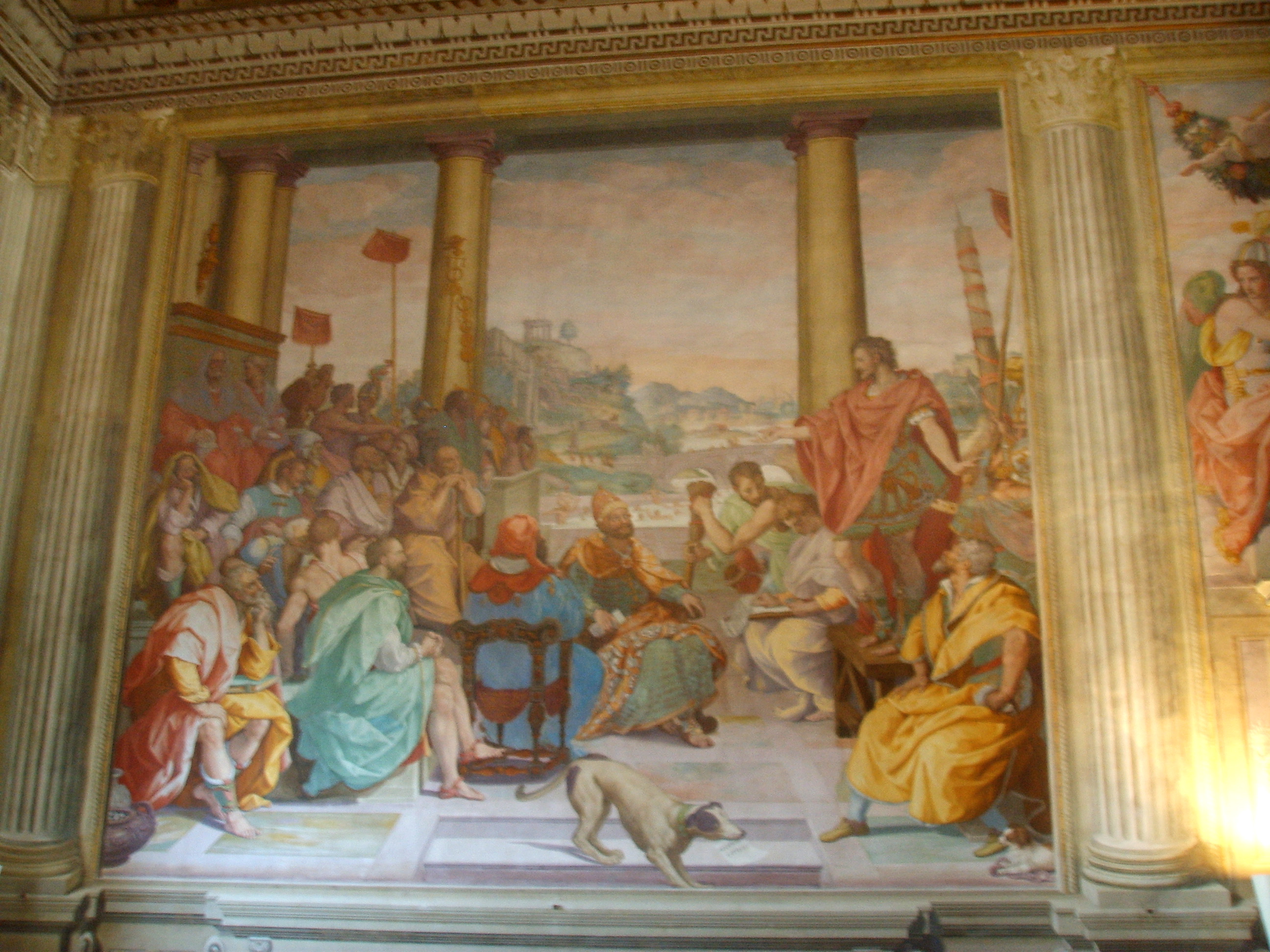 Villa medicea di Poggio a Caiano, inside